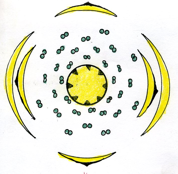 Papaver flower diagram, bloemdiagram Papaver